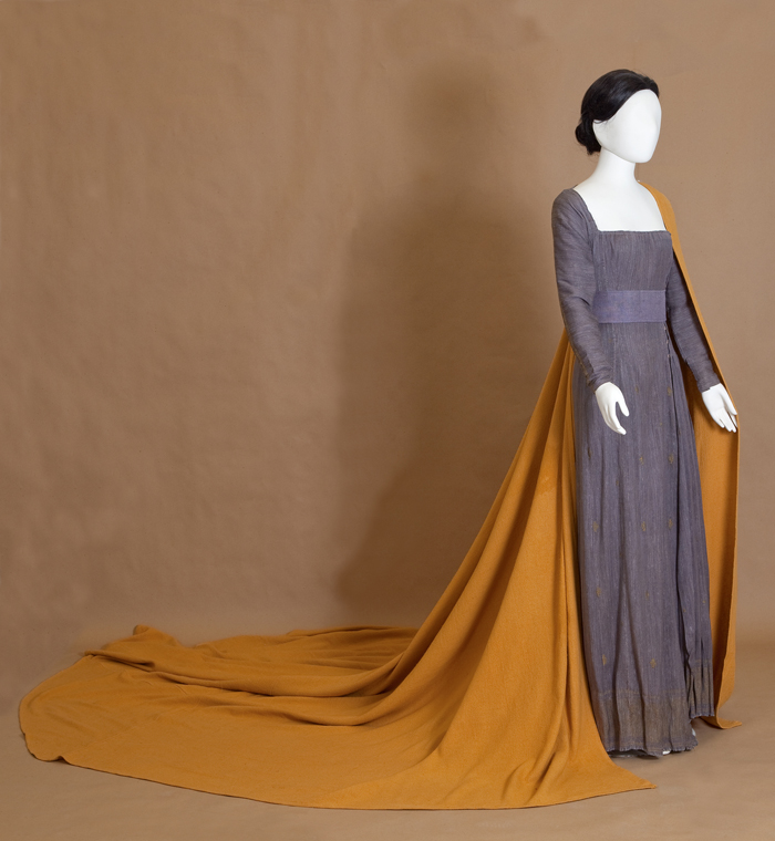 Θεατρικό κοστούμι του Γιάννη Τσαρούχη για τη Μαρία Κάλλας στη Μήδεια (Ντάλας, Τέξας) Αθήνα 1958 1987.6.93 / Συλλογή Πελοποννησιακού Λαογραφικού Ιδρύματος